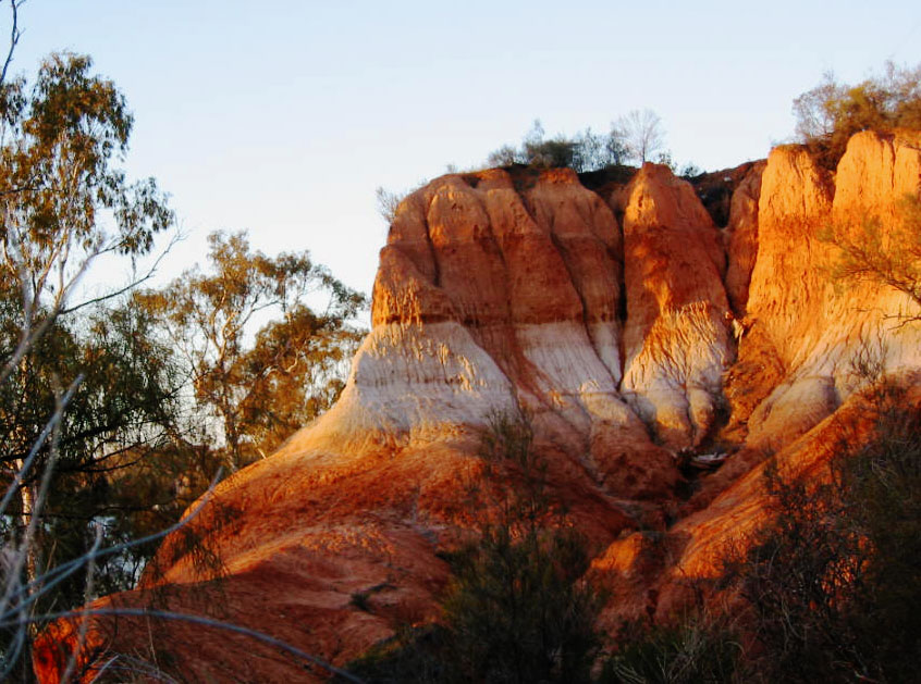 Les falaises de Red Cliffs (Australie)